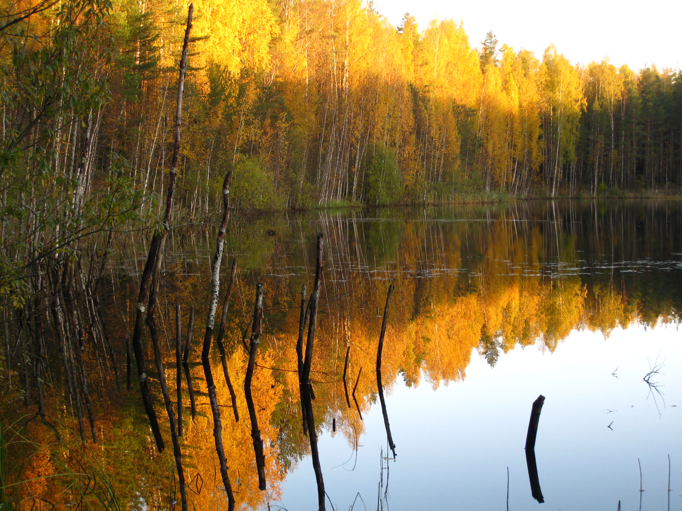 Kuradijärve lõunakaldal, Kurtna MKA